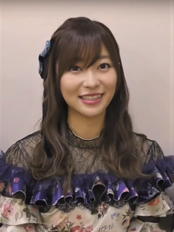 AKB48 Group大前輩 #柏木由紀 #指原莉乃 #峯岸みなみ來將經驗分享給TPE48參賽女孩們，呼籲大家要繼續支持喜歡的女孩喔！